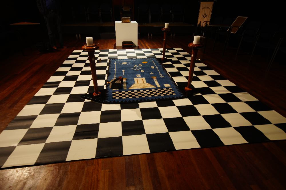 Het Tableau en de indeling van de ruimte tijdens een zgn. Open Loge